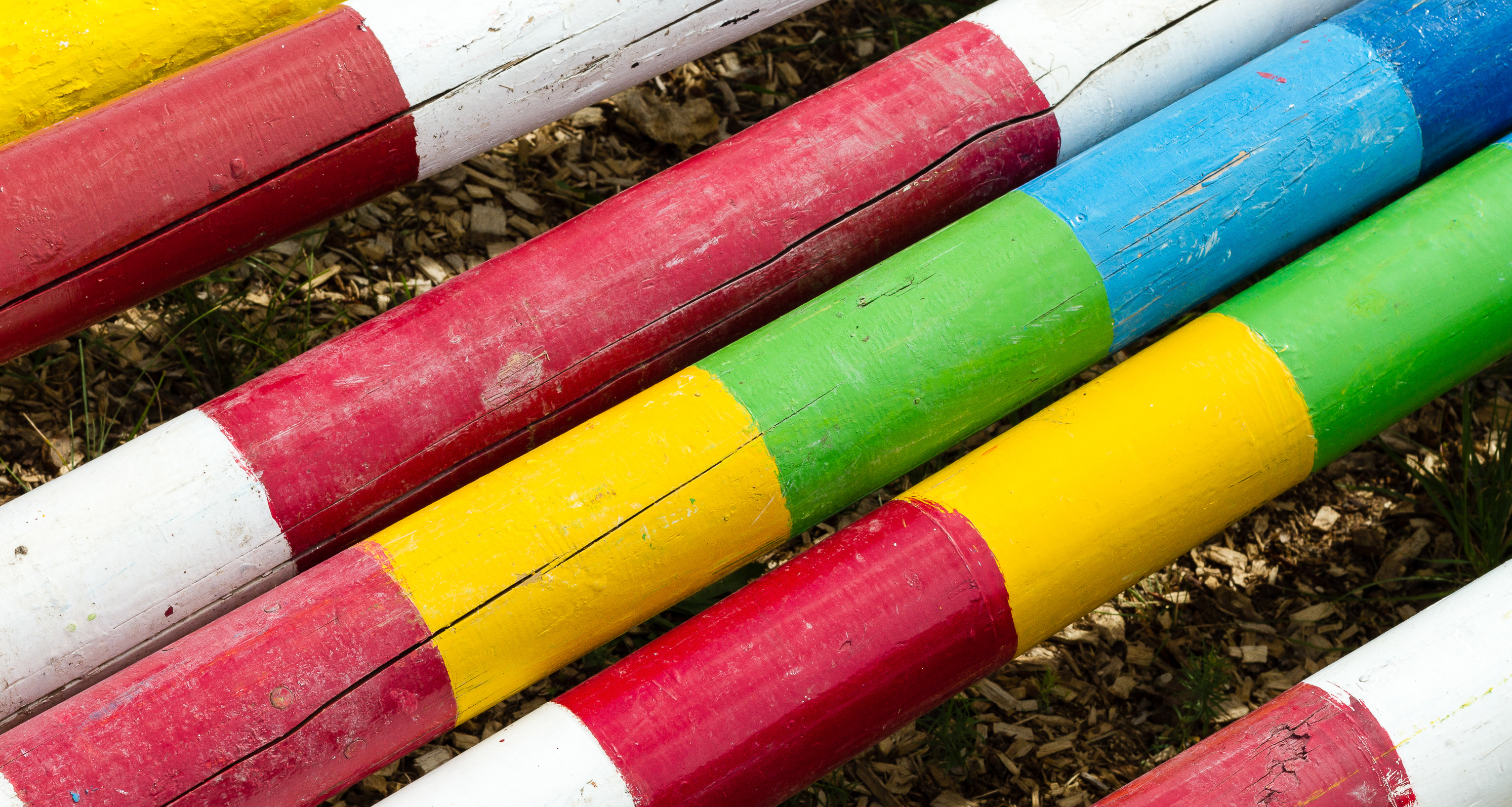 Colorful obstacle bars